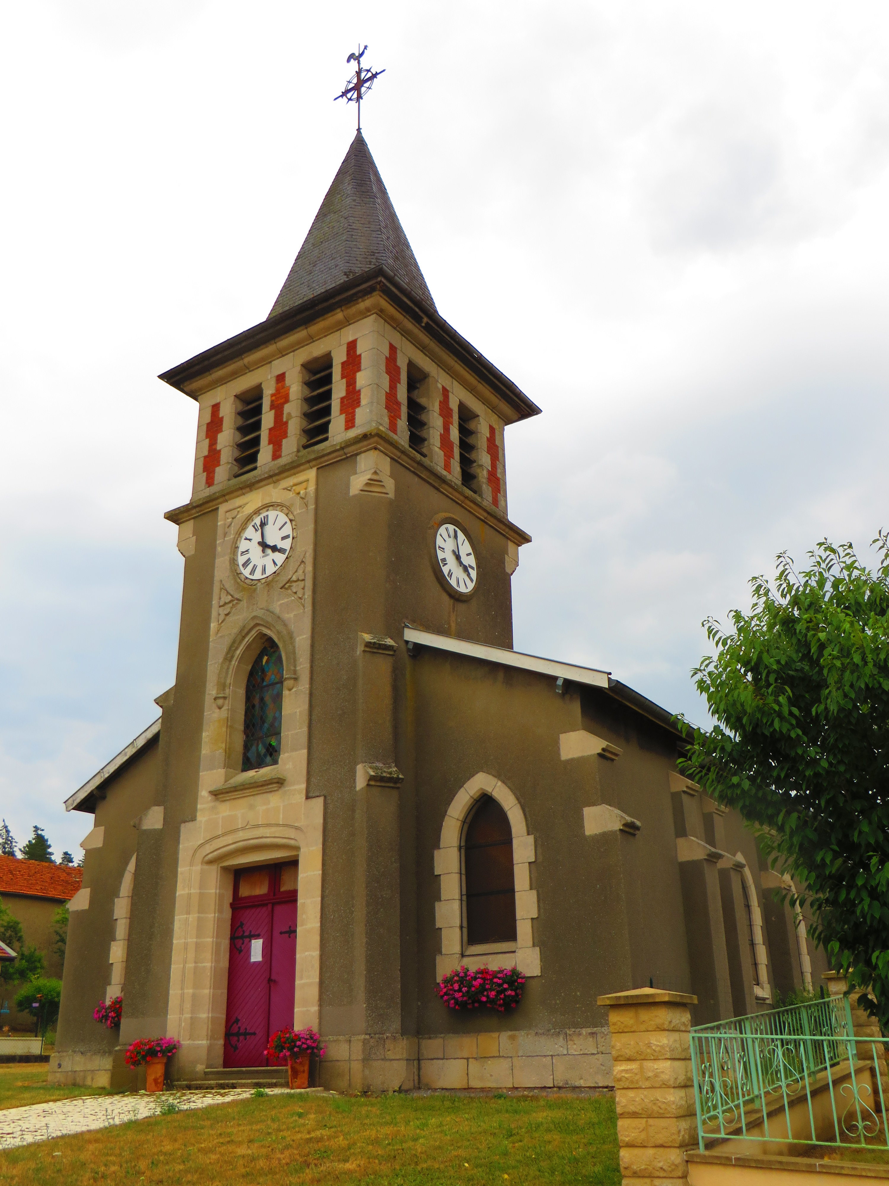 Samogneux L'église Saint-Remi